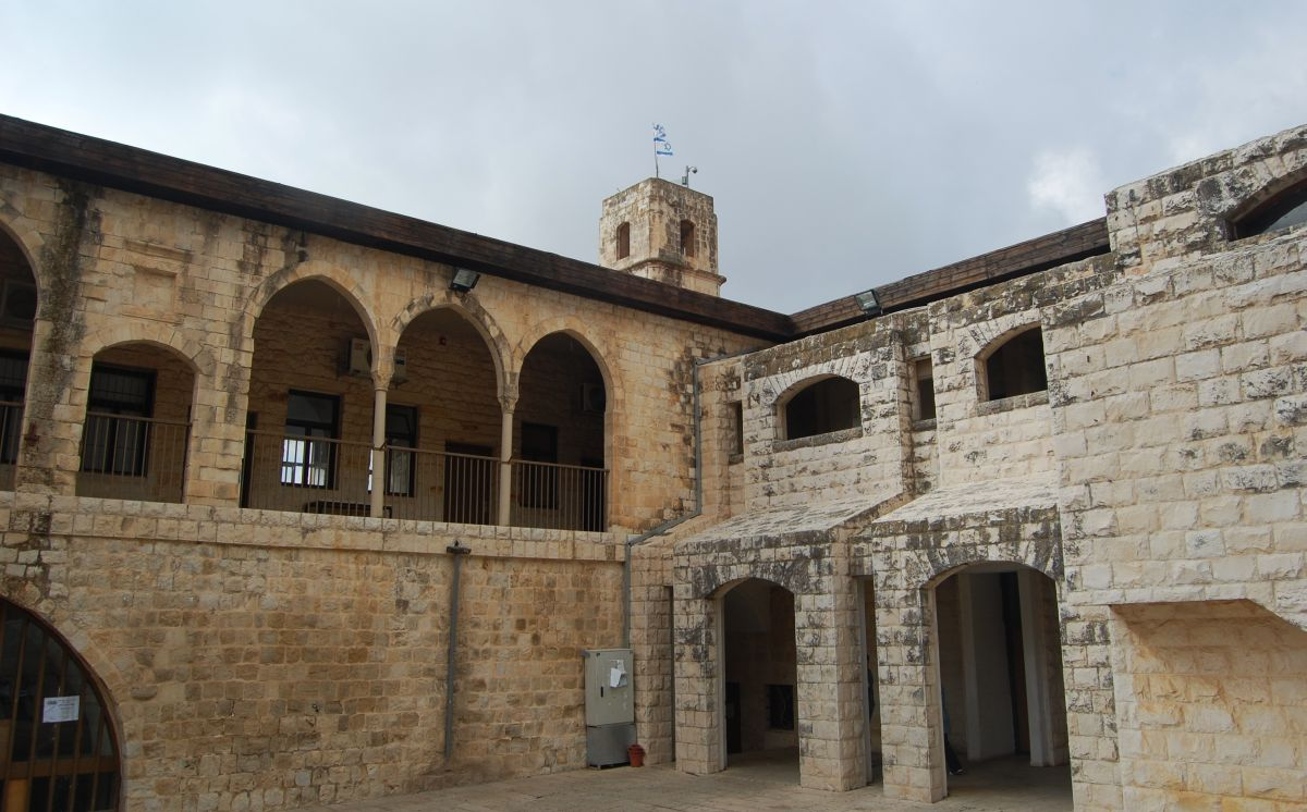 בניין הסראייה בצפת, בניין הממשל הטורקי ואח"כ הבריטי